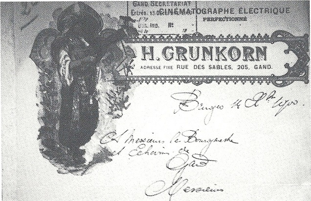 Briefhoofd van Henri Grünkorn (1856-1915), een pionier in de filmwereld, woonde toen in Gent - België